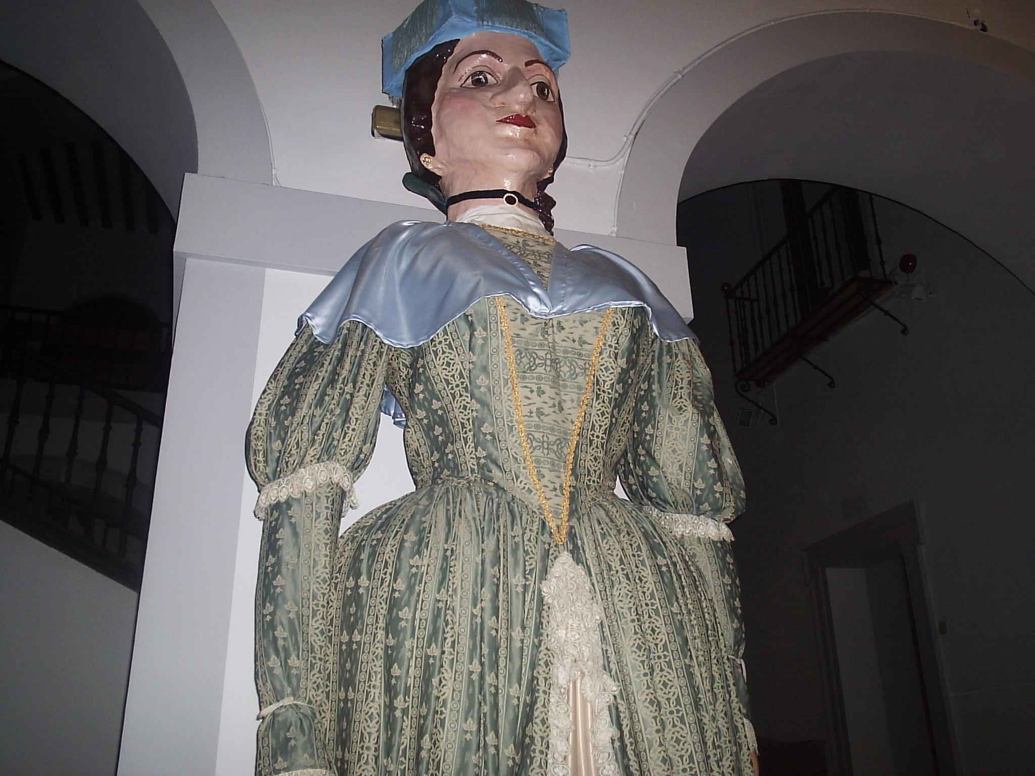 Gigante de la Doctora de Alcalá